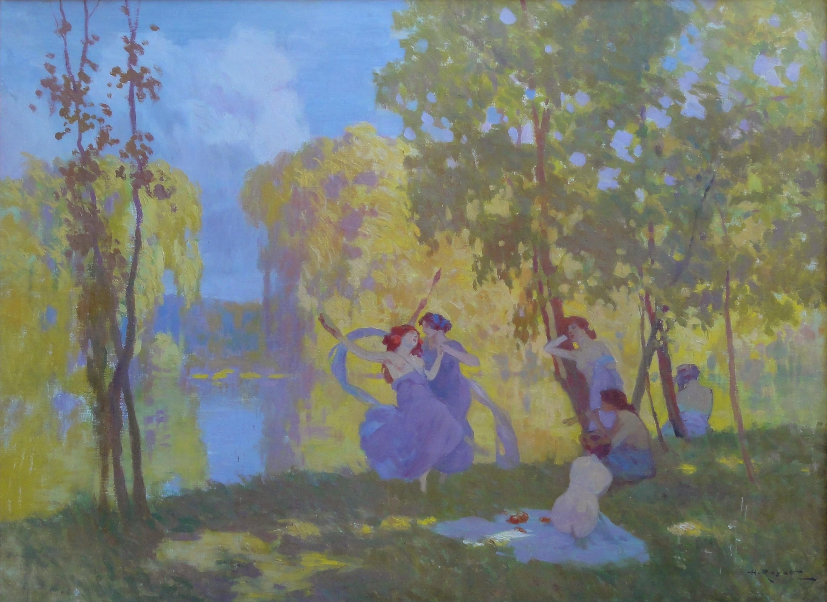 photographie du tableau "La danse" de Hyacinthe Royet, 1865-1926